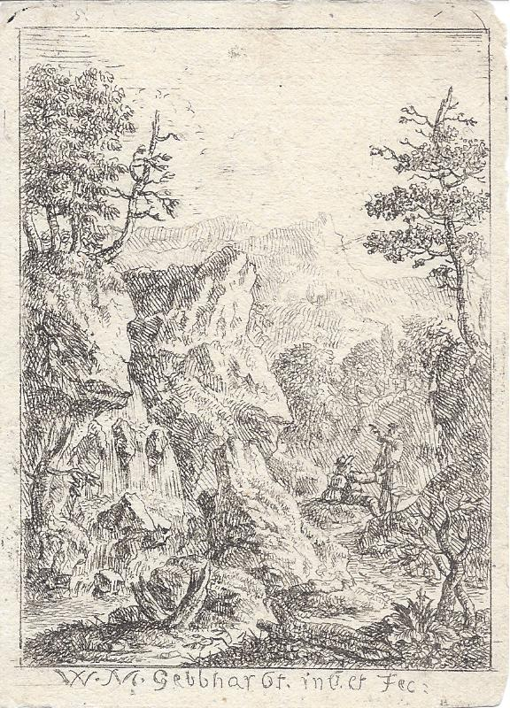 Wolfgang Magnus Gebhard: Zwei Reisende an einem Wasserfall. Kupferstich um 1739